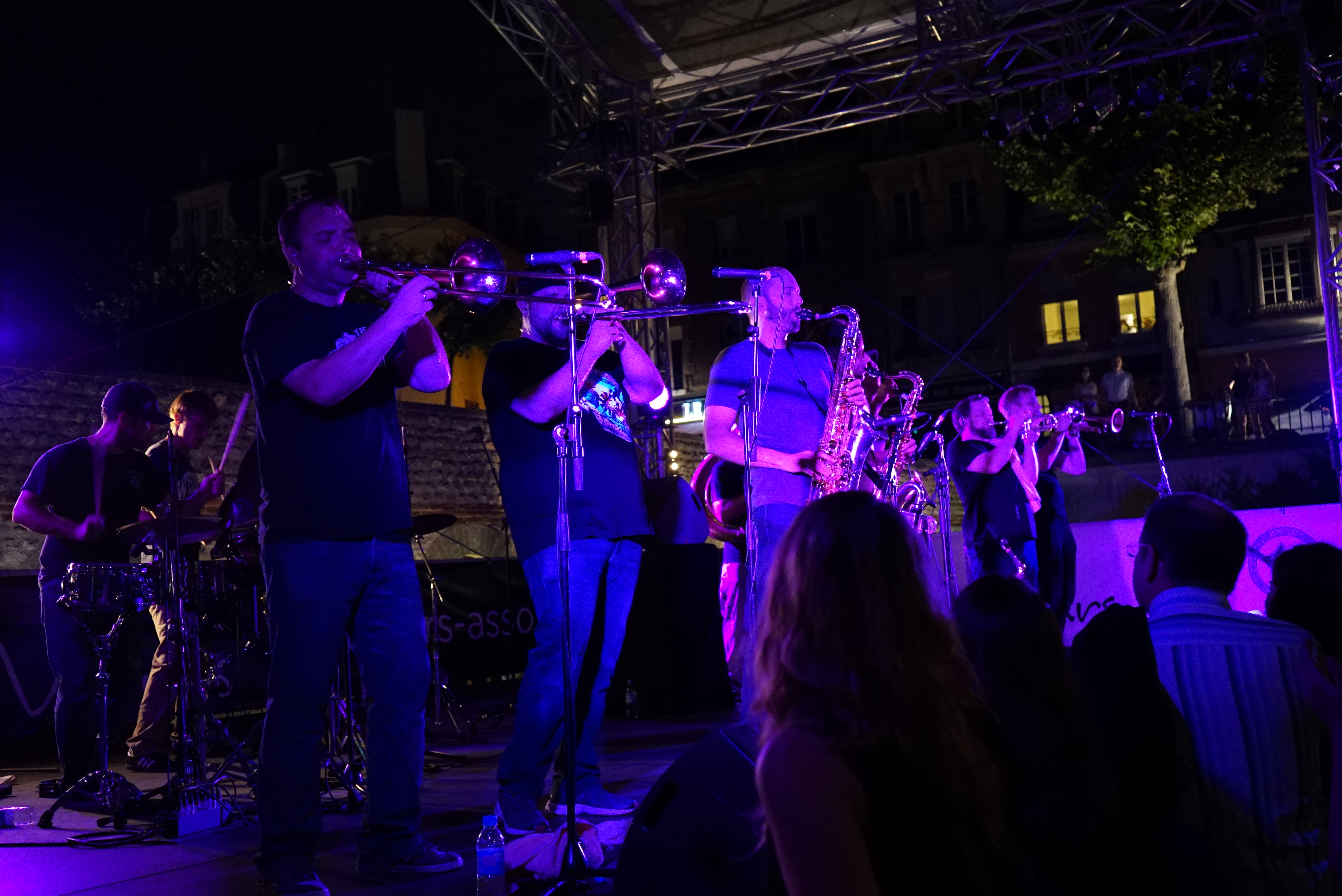 les Youngblood Brass Band à Reims.